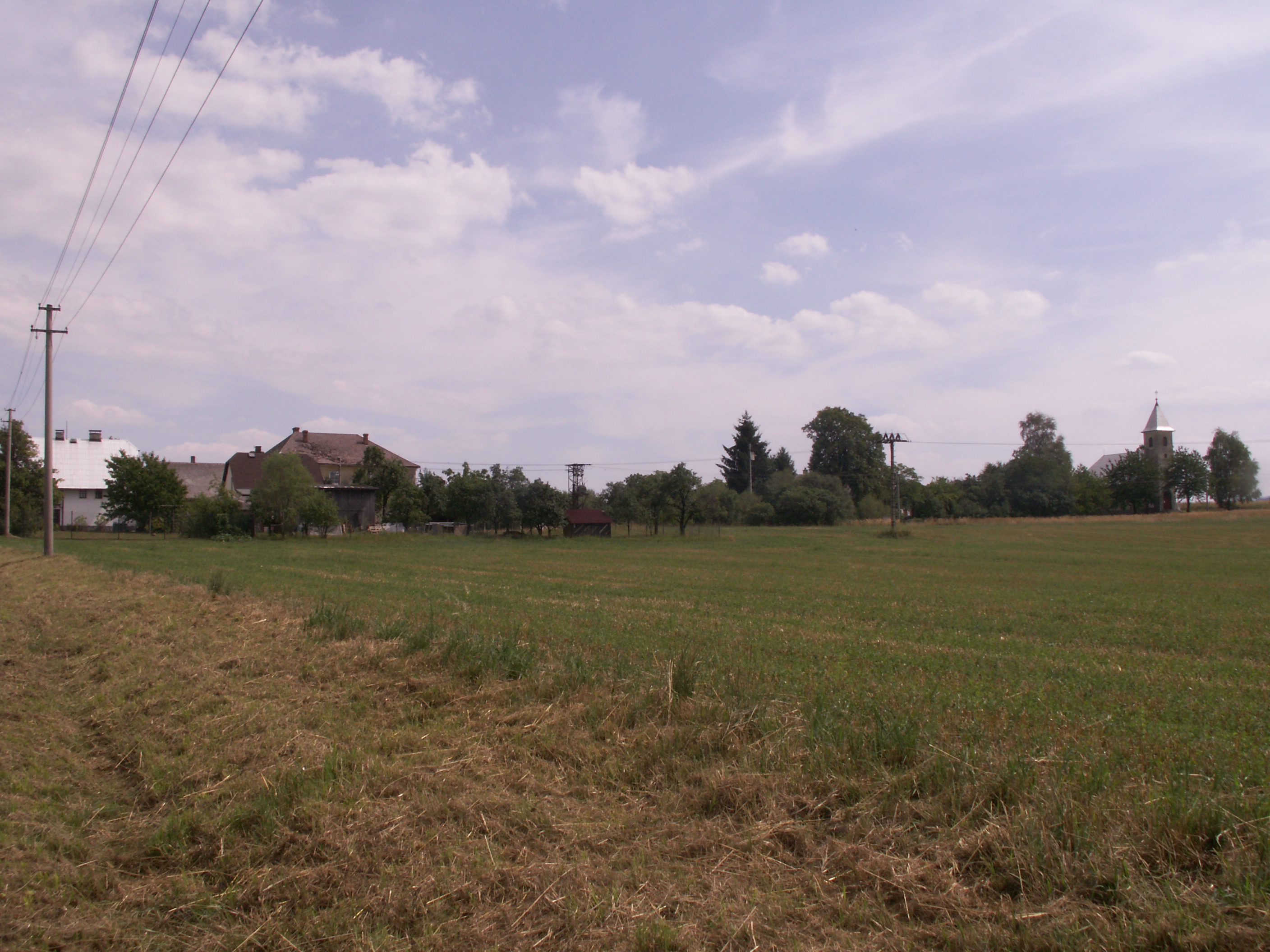 Kolnovice, část obce Mikulovice, okres Jeseník, část obce u kostela sv. Rocha